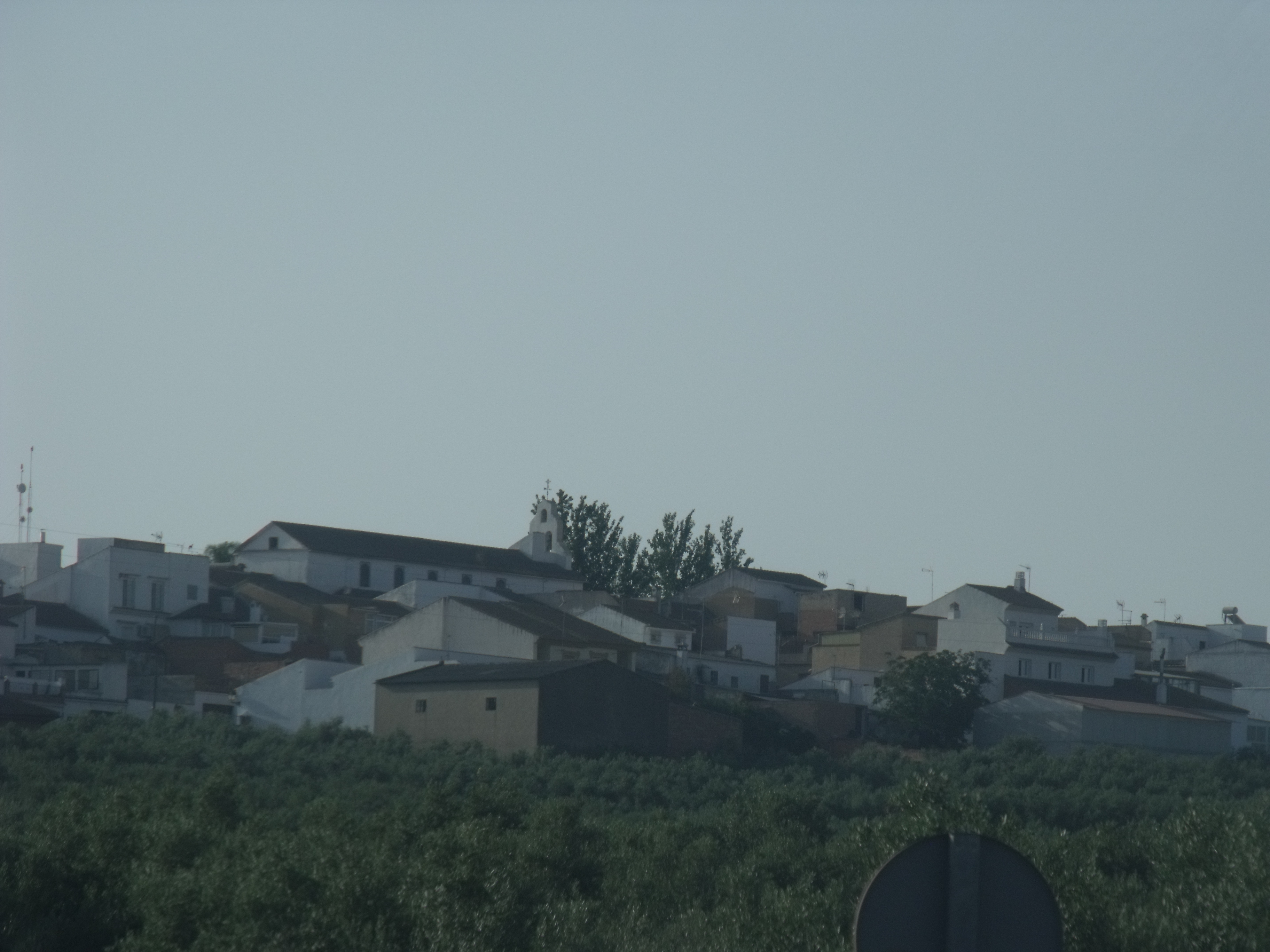 Vista general desde la carretera